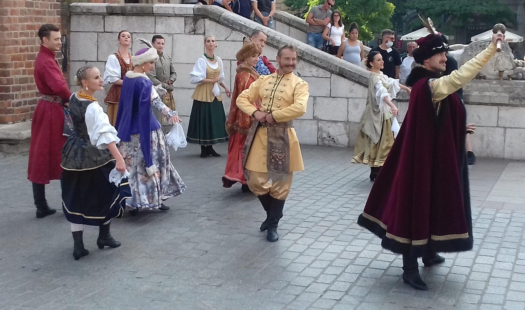 Balet Dworski „Cracovia Danza” podczas występu na rynku w Krakowie w lipcu 2020r.